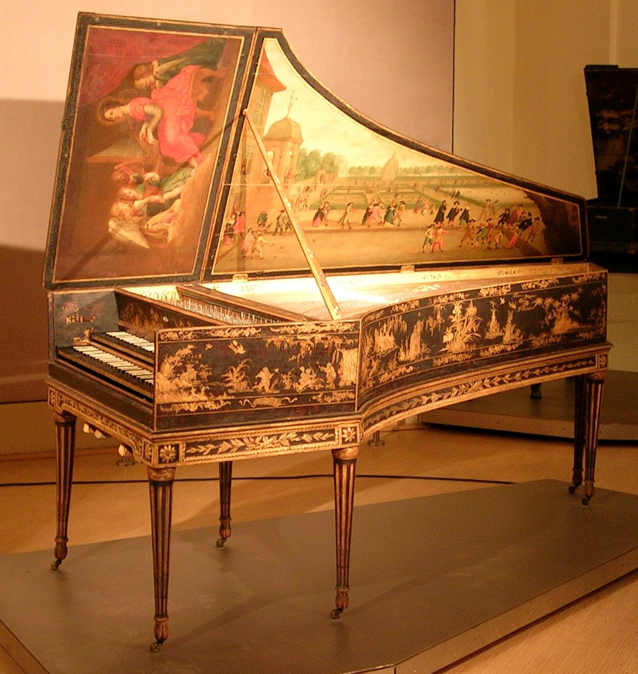 Taskin harpsichord (1788), Museum für Kunst und Gewerbe, Hamburg